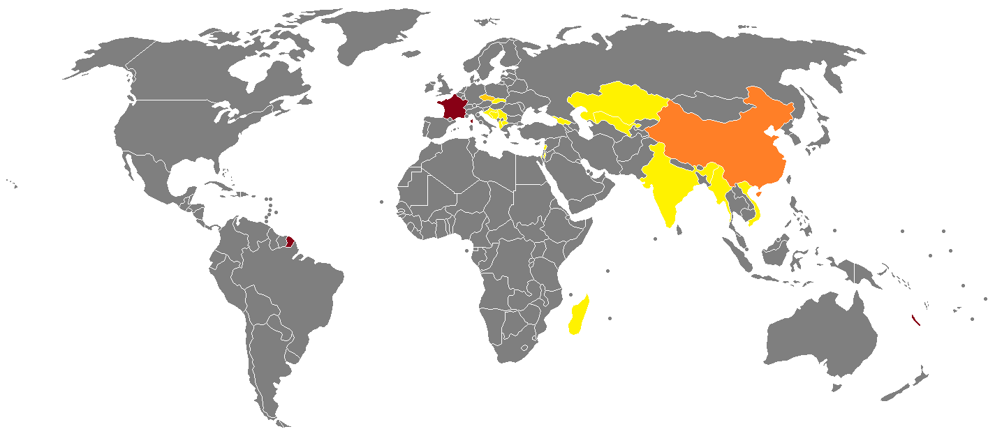 Cette carte montre les pays visités par les étudiants du Centre Universitaire d'Enseignement du Journalisme (CUEJ) au cours de leur session de délocalisation. Pays où se trouve le siège de l'école Pays où a eu lieu plus de 10 délocalisations Pays où a eu lieu entre 5 et 9 délocalisations Pays où a eu lieu entre 2 et 4 délocalisations Pays où a eu lieu 1 délocalisation